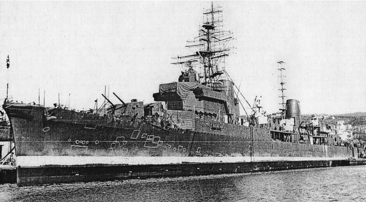 Nave San Giorgio durante i lavori di trasformazione in nave scuola effettuati tra il 1963 e il 1965 all'Arsenale di La Spezia. I cerchi e i rettangoli indicano punti di corrosione delle lamiere da rinforzare o sostituire. (foto tratta da: Elio Andò, Incrociatori leggeri Classe Capitani Romani, Parma, Ermanno Albertelli, 1994)